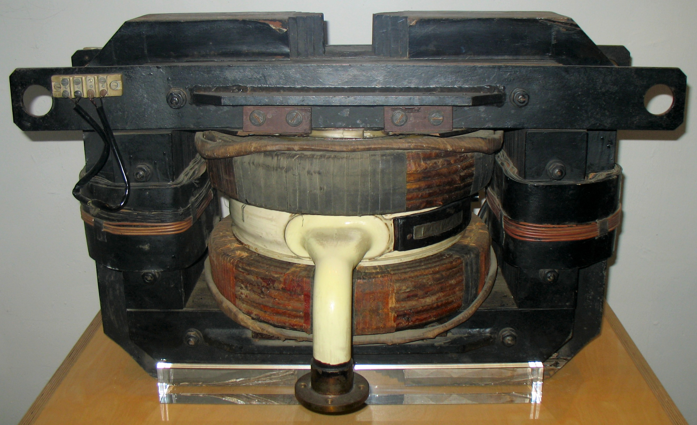 6MeV Betatron von Konrad Grund (Konstruktionsbeginn 1942) Fotografiert im Deutschen Museum Bonn